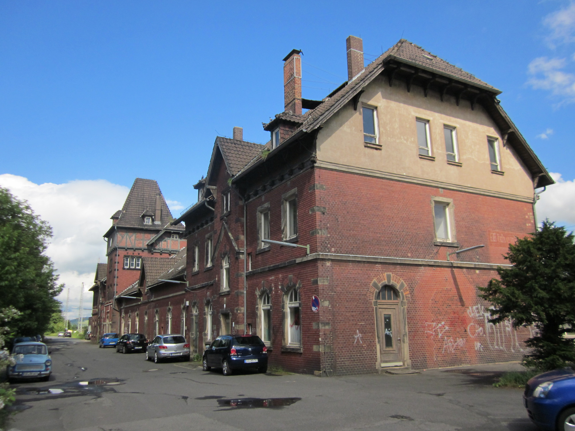 Bahnhofsgebäude Eichenberg, Straßenseite